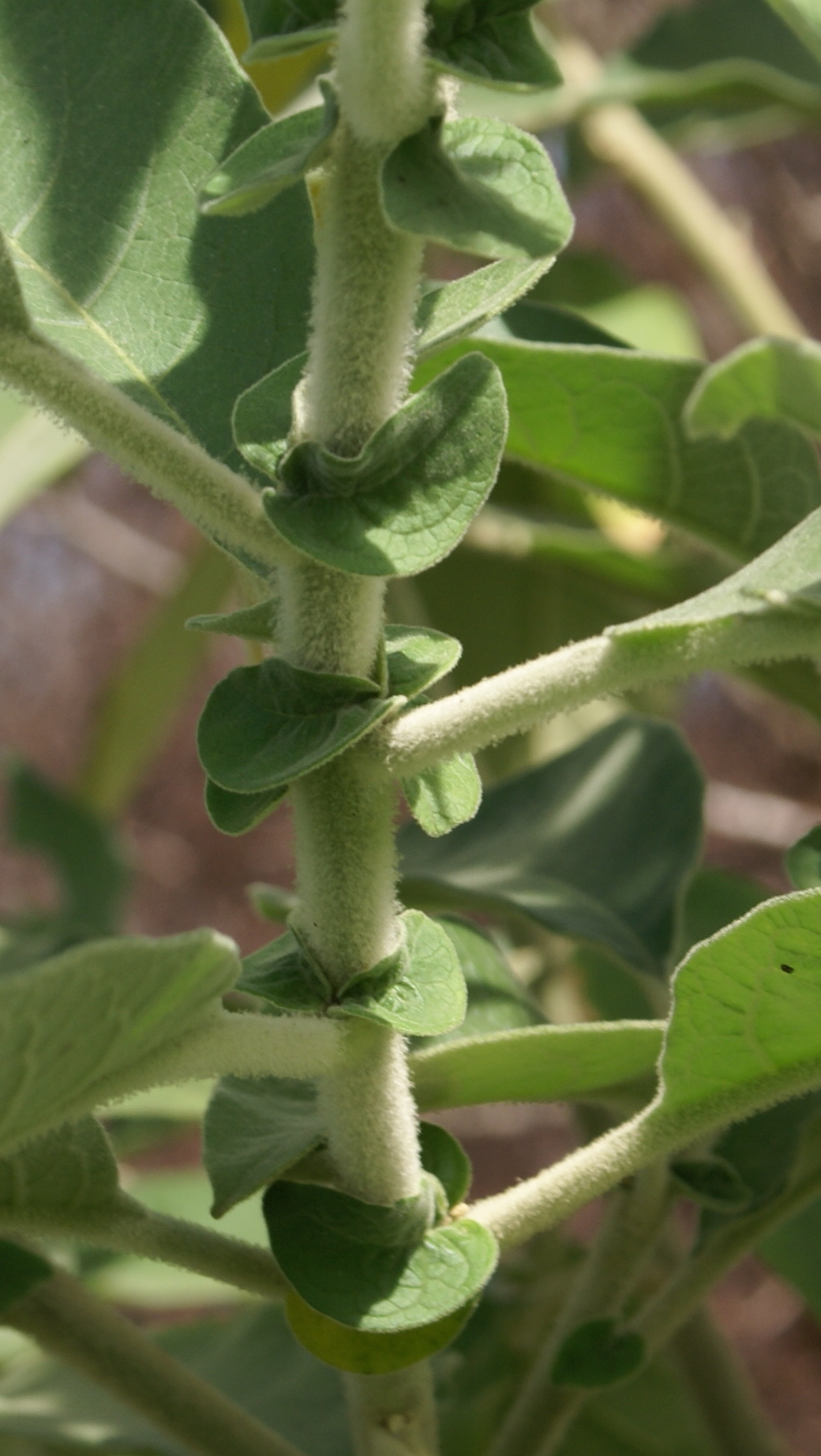 détail des micro feuilles de Solanum mauritianum